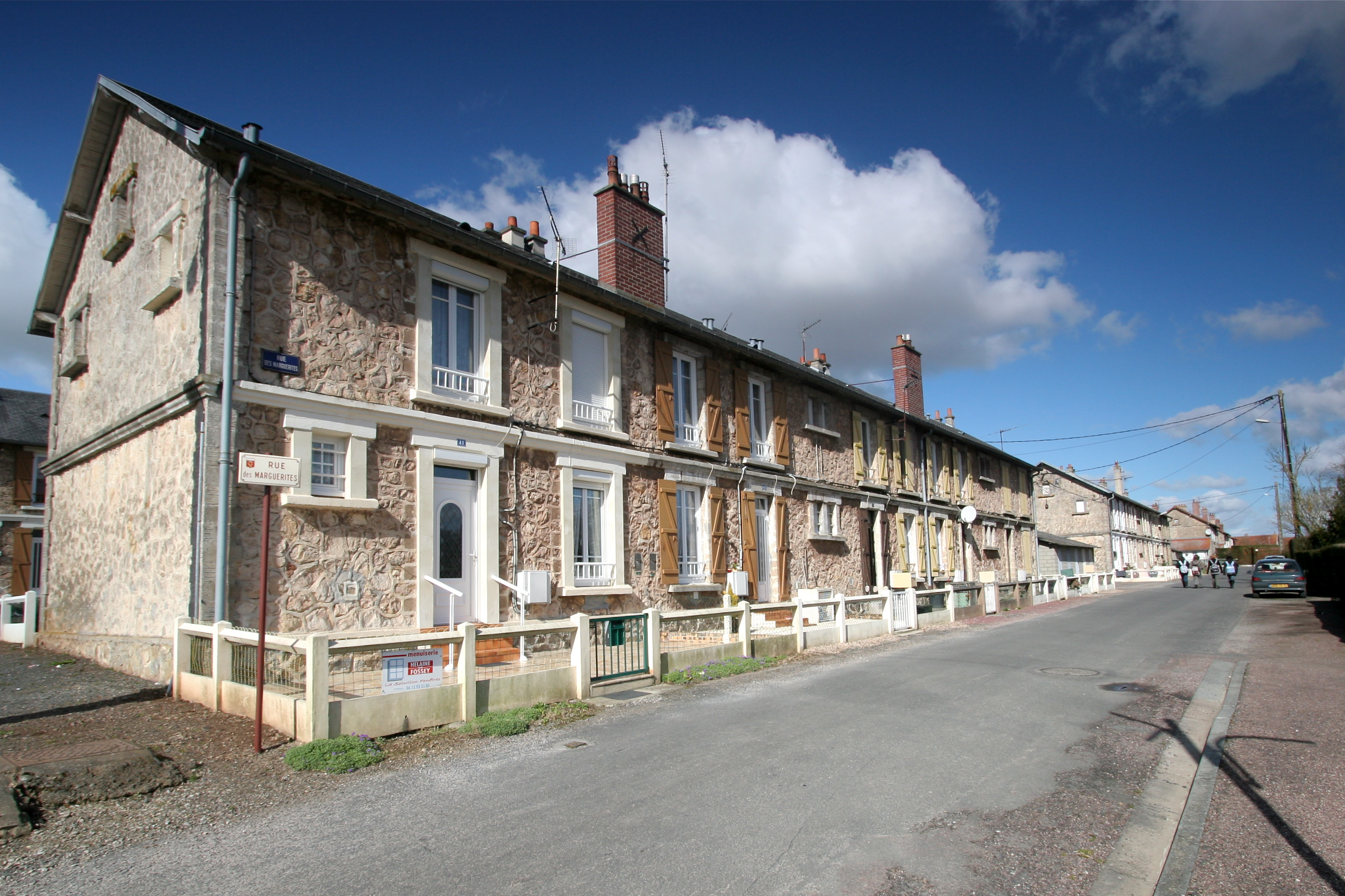 Maisons de mineurs dans une rue de Potigny, Calvados, FRance